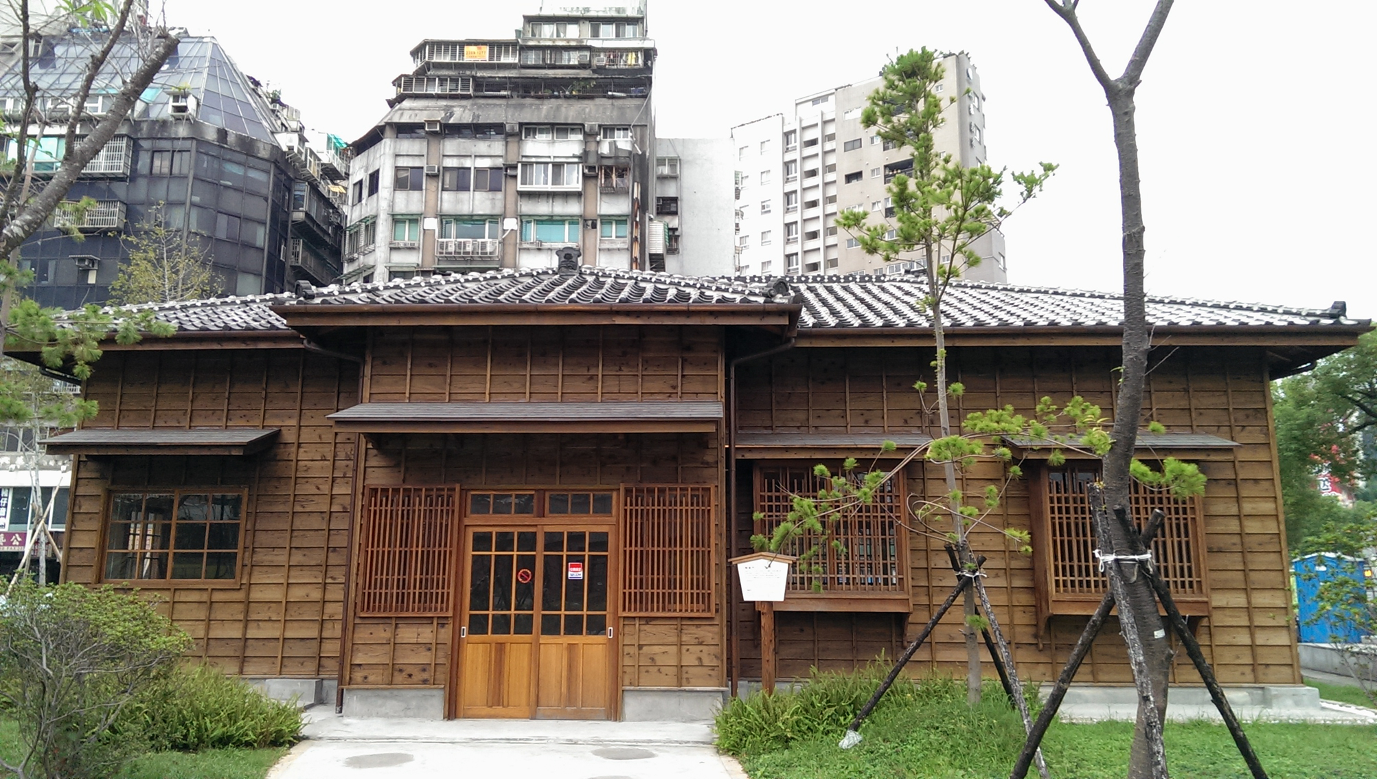 臺北西本願寺輪番所